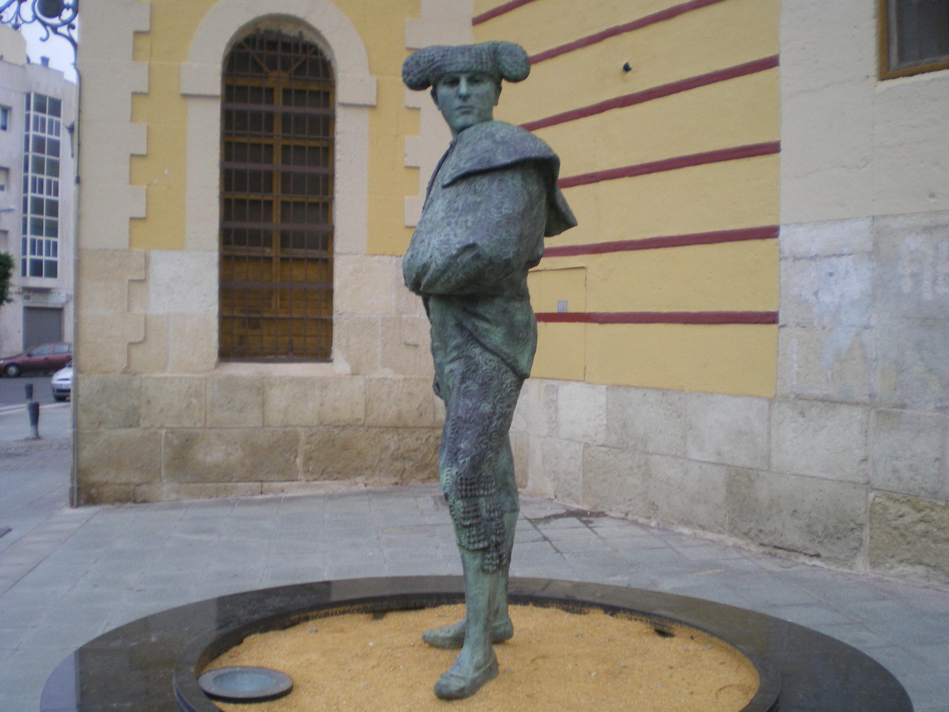 Escultura de Julio Gómez Cañete, torero de Almería (España), junto a la plaza de toros de Almería, del escultor rumano Ioan Septimiu Jugrestan, inaugurada el 24 de agosto de 2008.